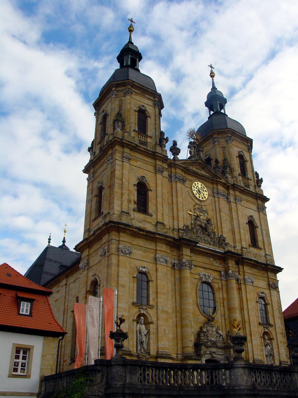 Die prächtige Frontansicht der Basilika Gößweinstein (Ofr.)